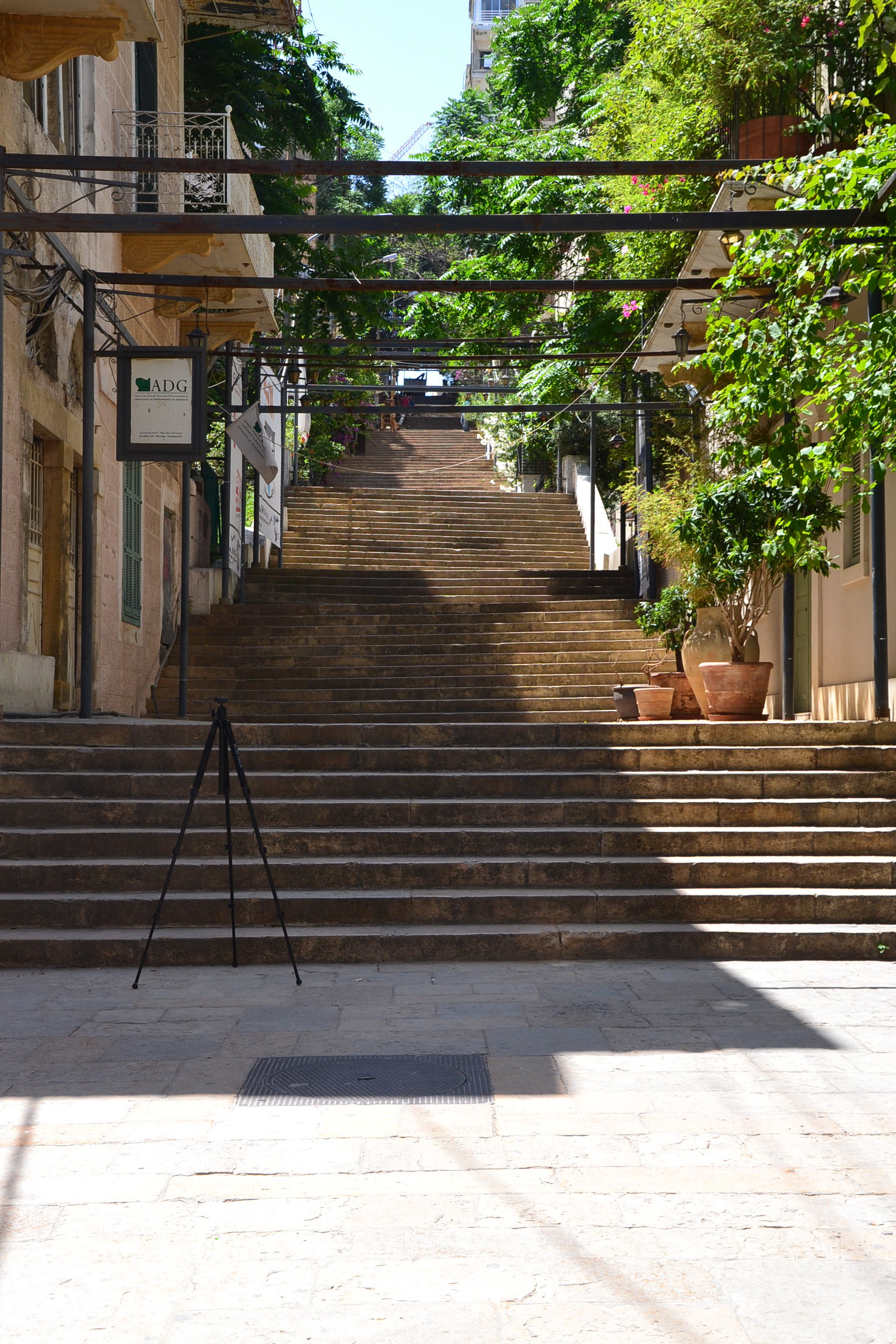 Escalier Saint-Nicolas de Beyrouth